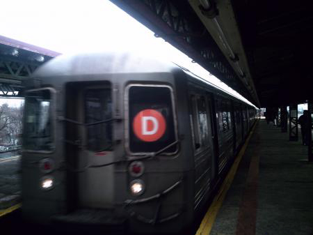 Tren de la línea D del metro de NY